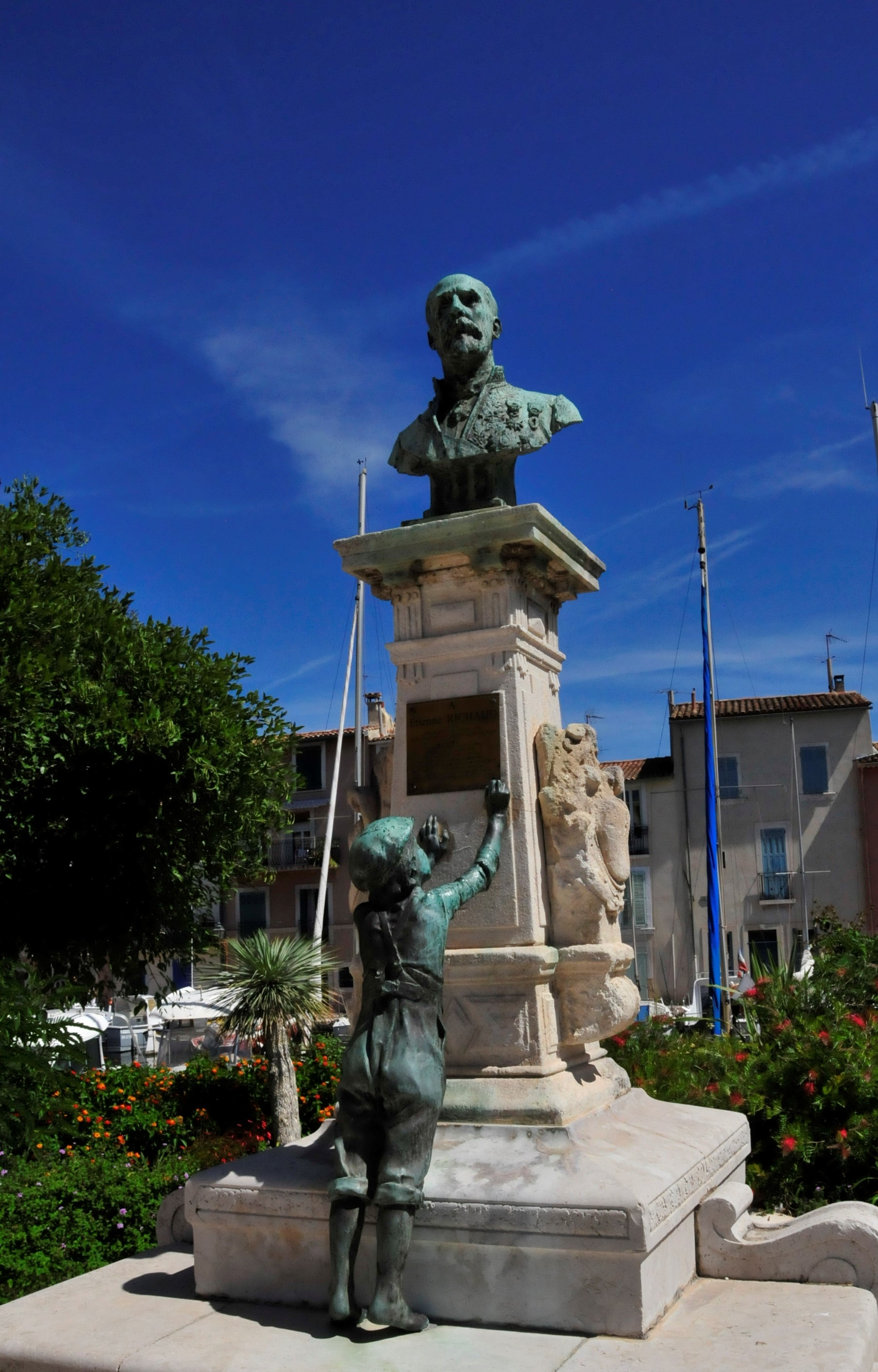 Martigues, Denkmal für Richaud, den Erfinder des Wasserflugzeugs